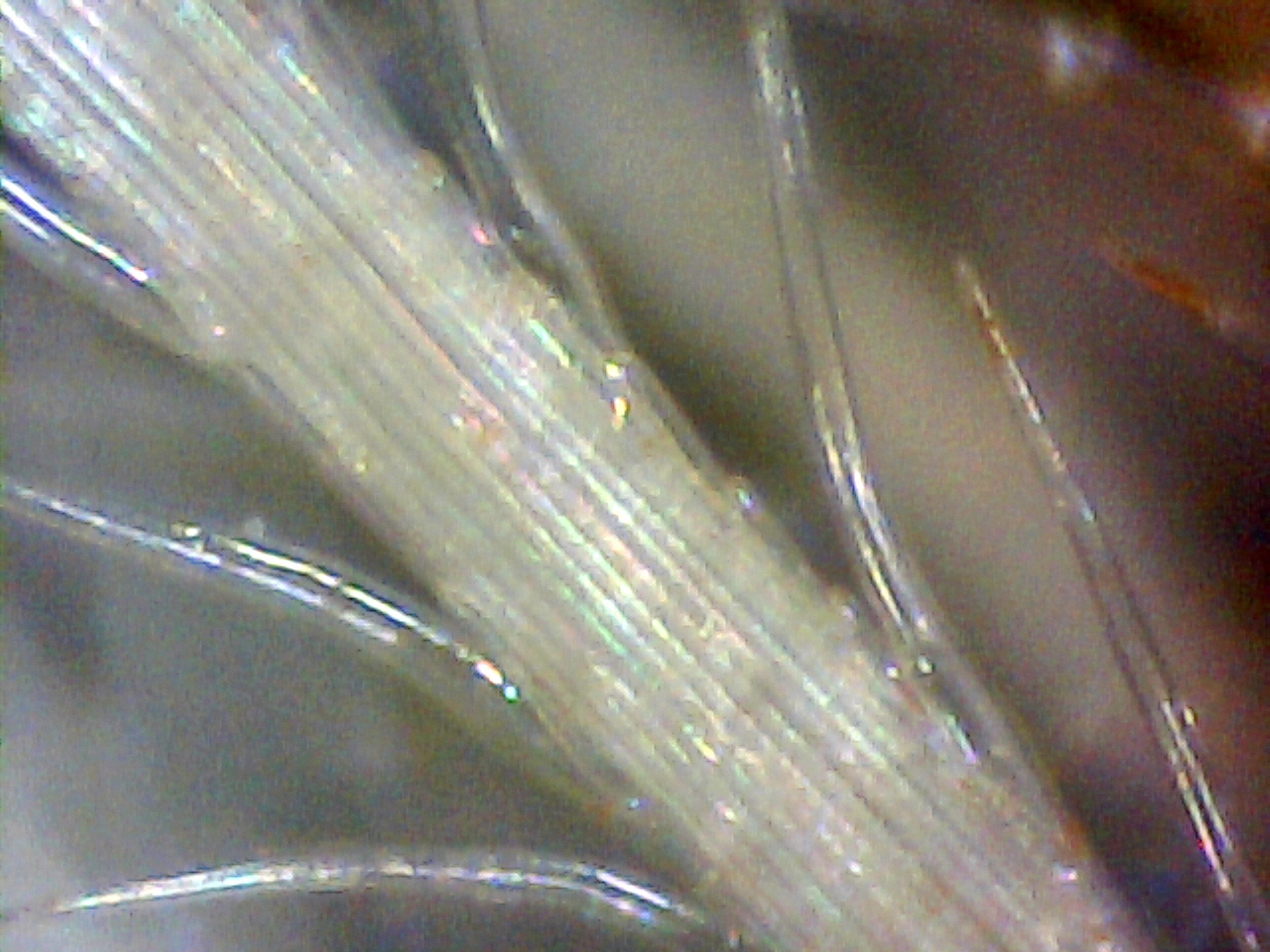 Onopordum nervosum (Cardo gigante) - Vilano subplumoso/escabrido - x350 . - Carretera nacional N301, km209,250, Paraje el Carril de la Longaniza, circa La Roda (Albacete, España).